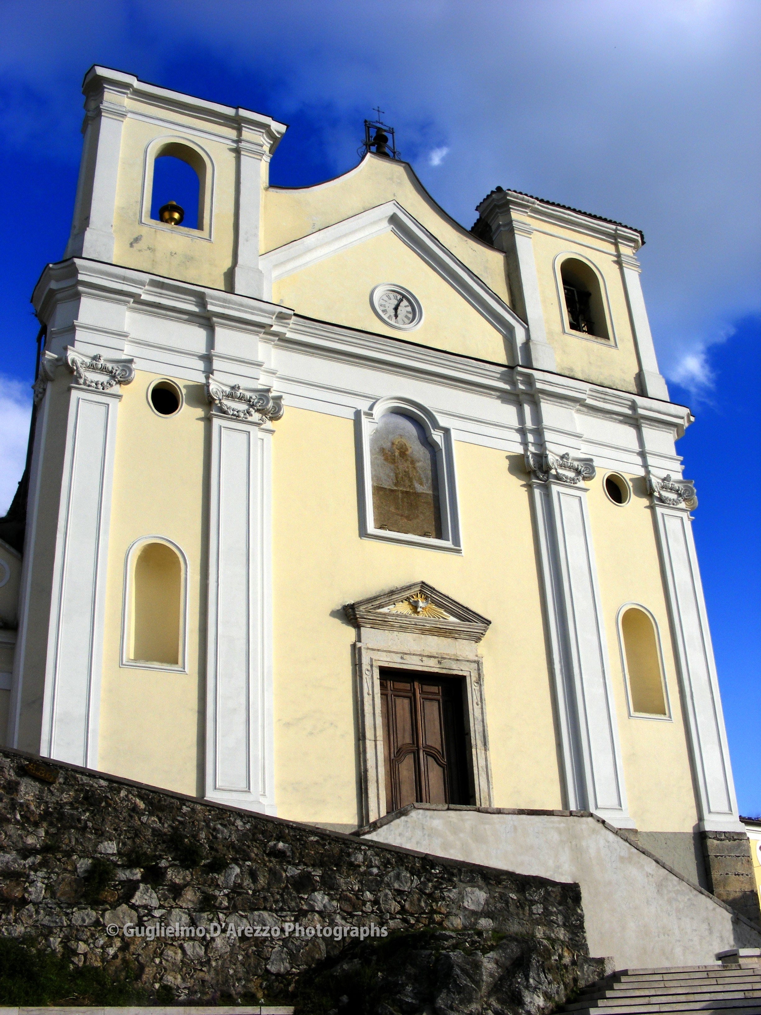 Guglielmo D'Arezzo, autore, Chiesa di San Bartolomeo Apostolo, uso libero con attribuzione.